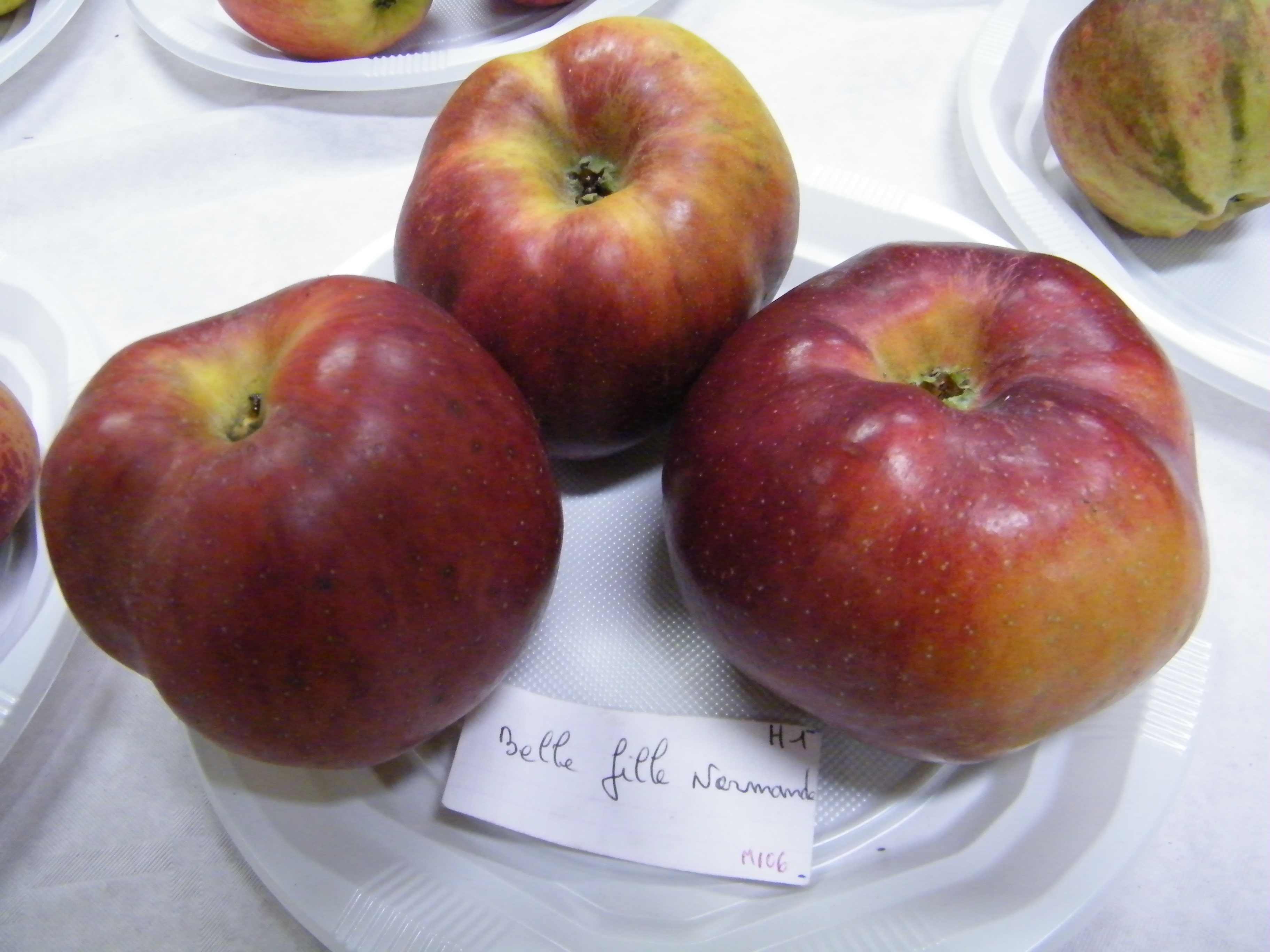 Belle Fille Normande, variété de pomme originaire du Pays de Caux, Normandie, Fr.